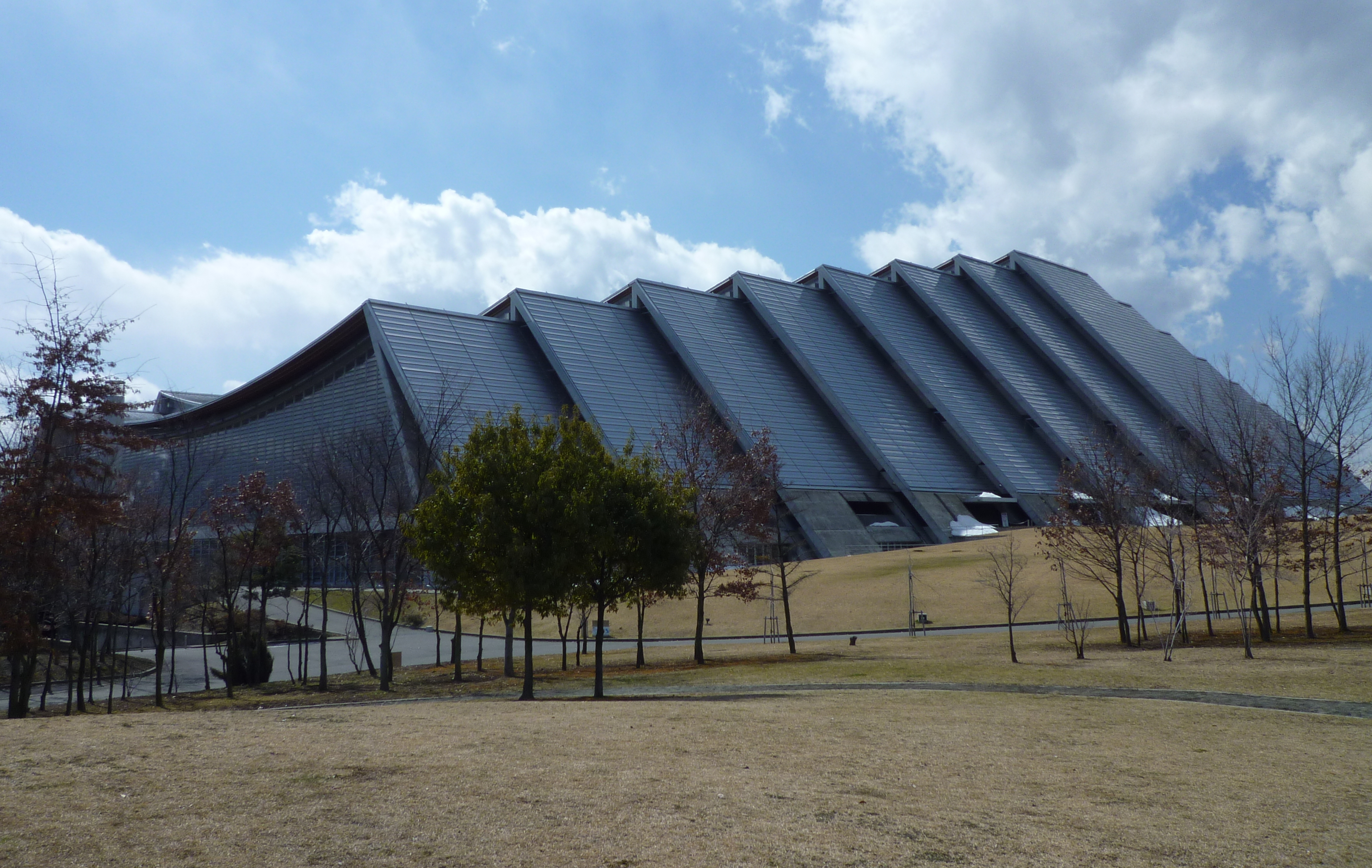 エムウェーブの外観写真。デジカメで撮影。